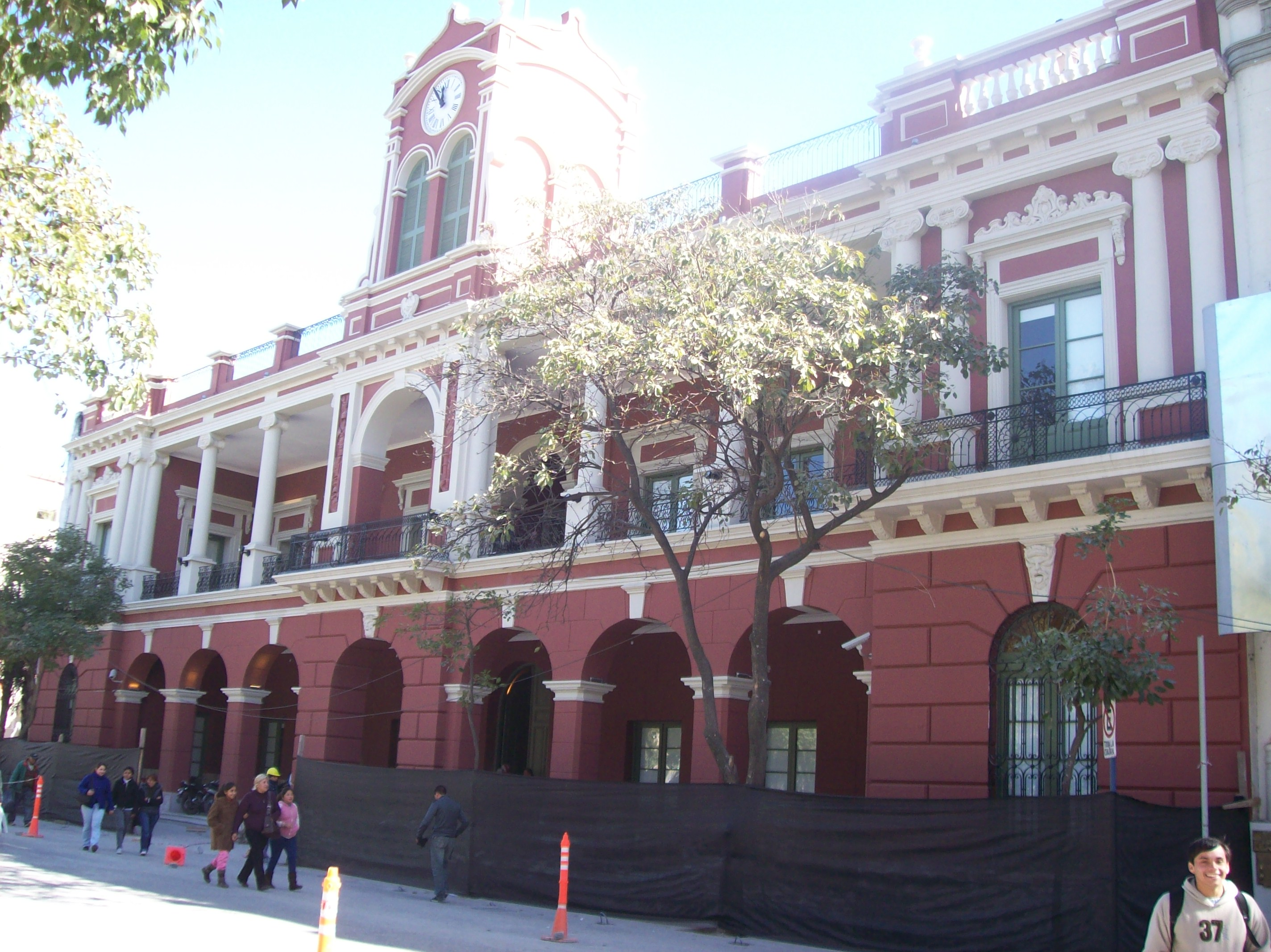 Complejo Cultural de Santiago del Estero frente a la Plaza Libertad, en la ciudad capital de la provincia de Santiago del Estero, Argentina.